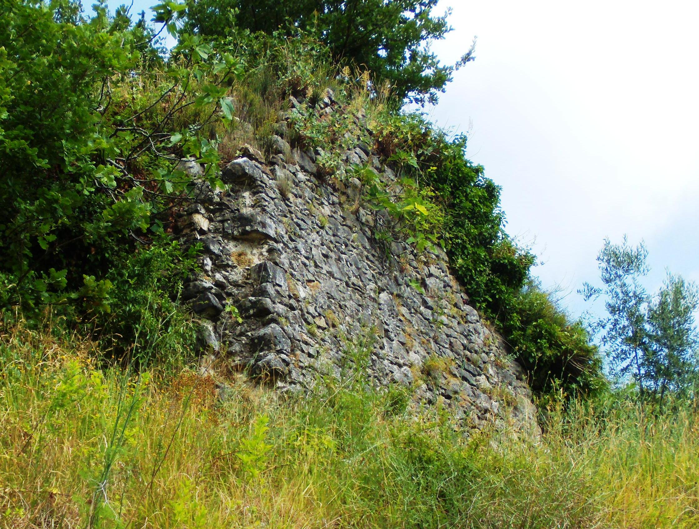 Ruderi di Cerreto antica lungo la strada comunale San Giovanni in Cerreto Sannita (Benevento). Con la denominazione Cerreto antica (comunemente commutata in Cerreto vecchia o in vecchia Cerreto) si intende l'insediamento (IX secolo-1688) che precedeva l'attuale Cerreto Sannita, edificata dopo il terremoto del 5 giugno 1688.